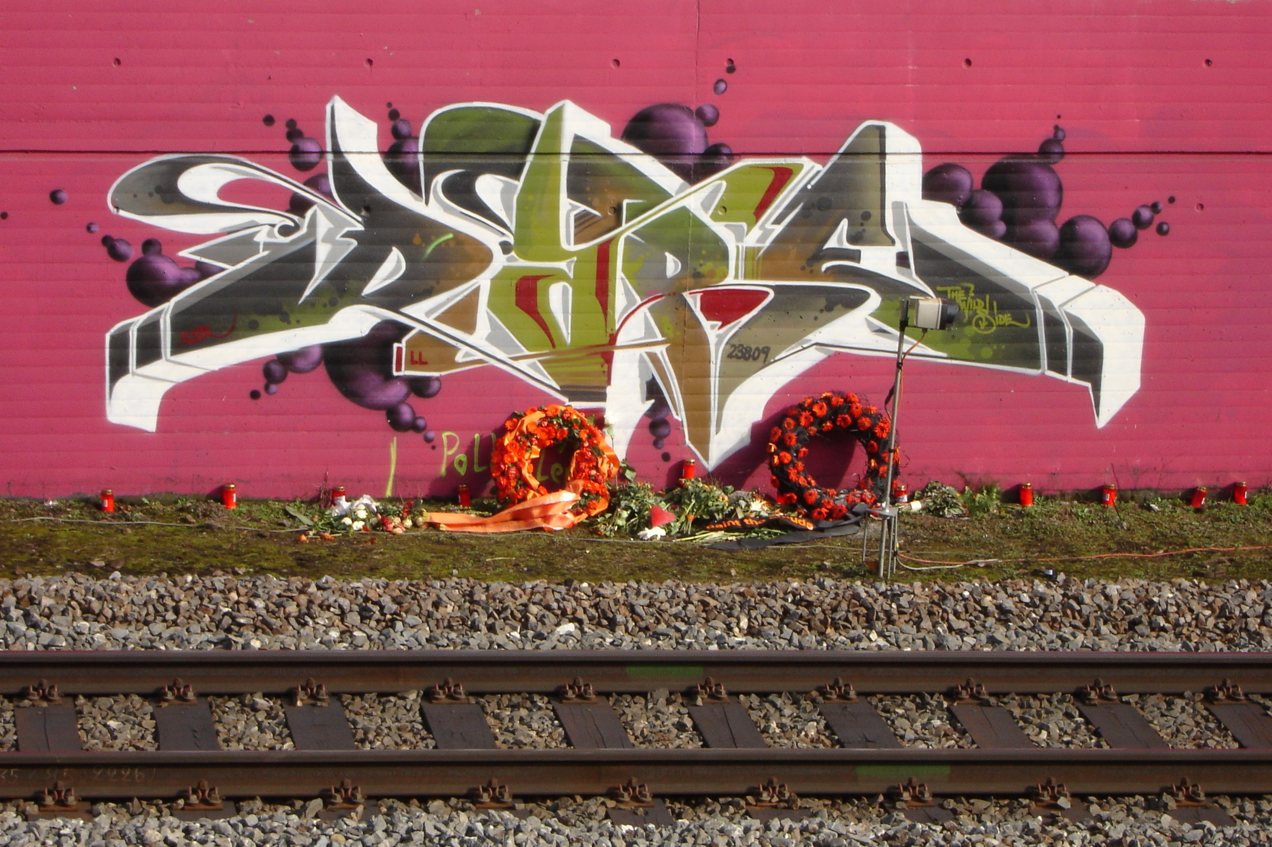 Trauer an der Basel-Line, Kränze und Kerzen an einem Dare Graffiti 2010